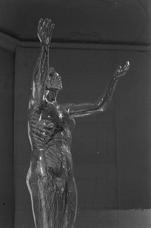 Original image description from the Deutsche FotothekDie Gläserne Frau